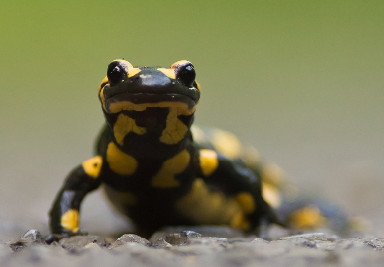 Salamandre tachetée (Salamandra salamandra) sur une route à Balma, France. Cette image est un simple recadrage d'une image postée sur Commons en 2012 par Paligui : File:Salamandre tachetée.png